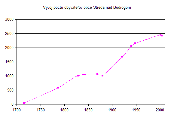 Graf Vyvoj_poctu_obyvatelov_streda_nad_bodrogom